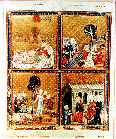 Hagadá Dorada, realizada en Barcelona, 1320, fol. 7r. Escenas de la vida de Jacob y José.